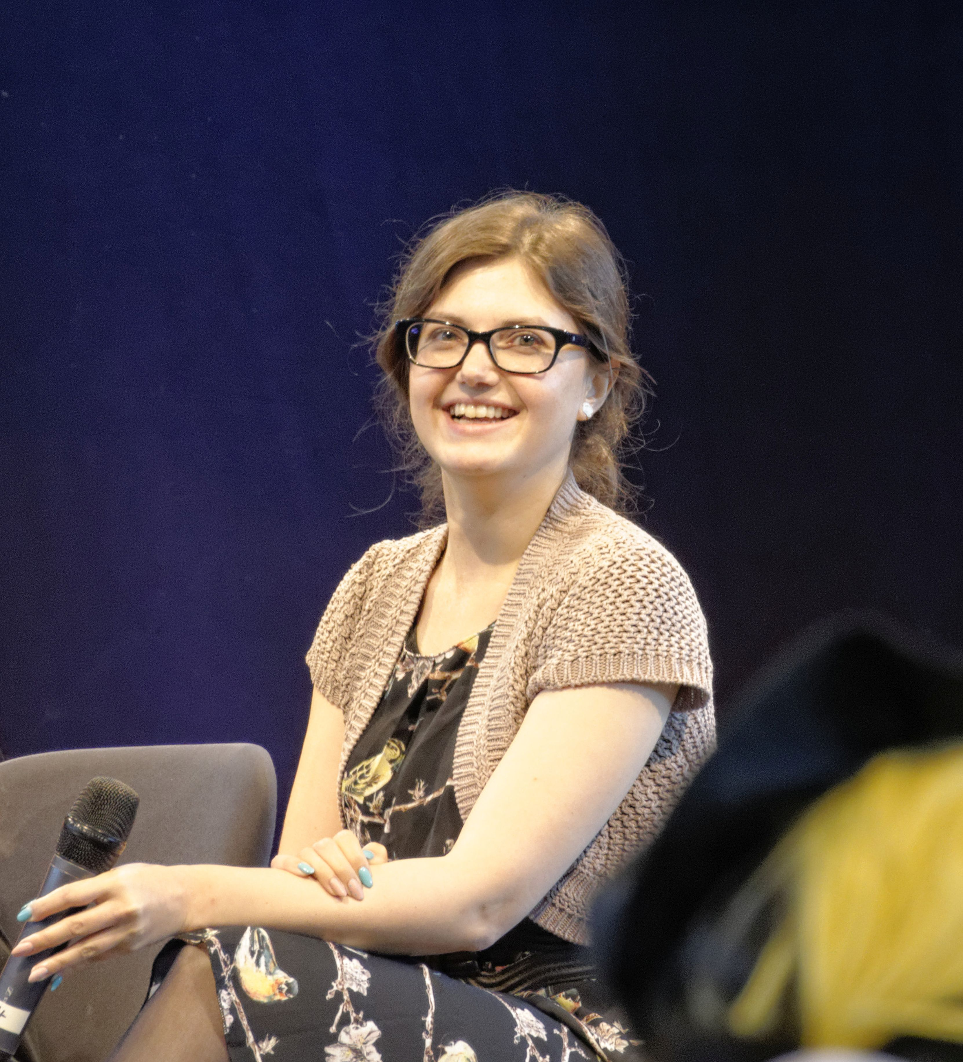 Bilder von der Comic Con Germany in Stuttgart 2018